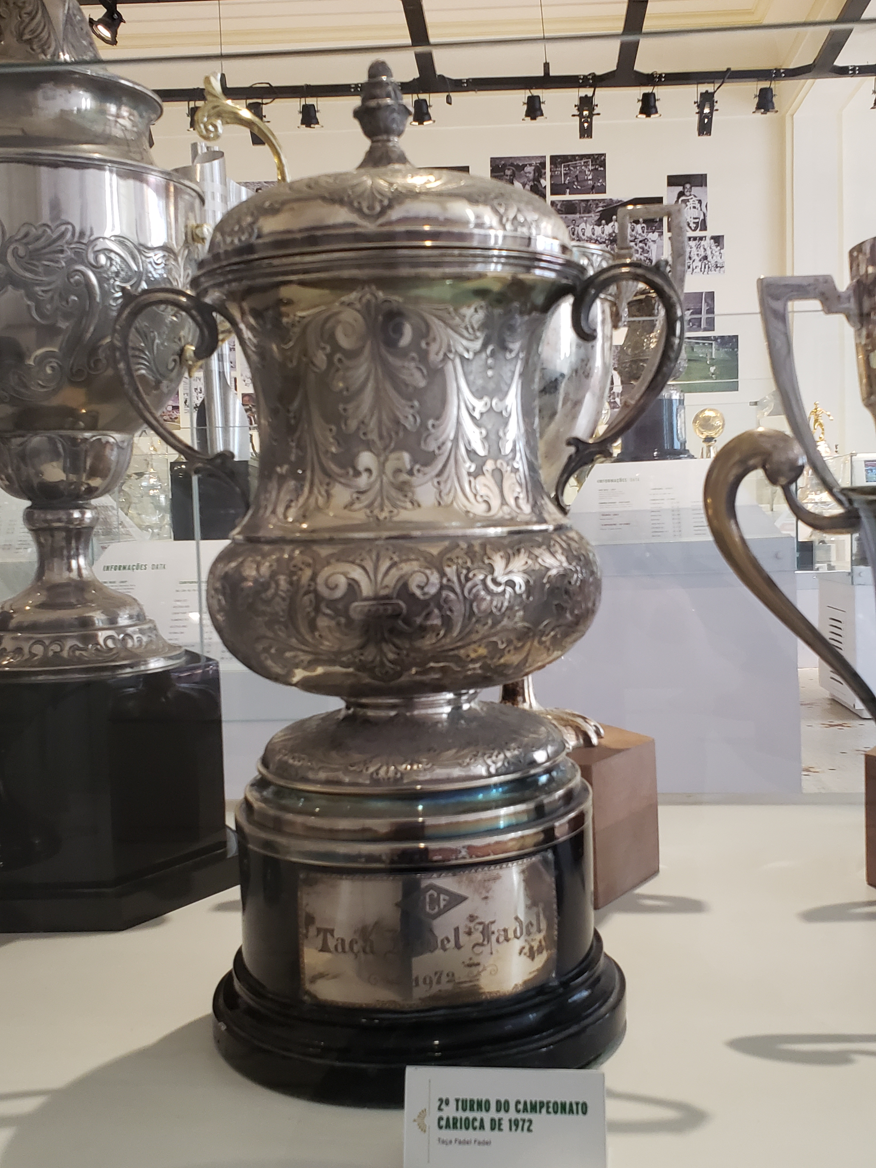 Segundo Turno do Campeonato Carioca de Futebol de 1972, conquistado pelo Fluminense Football Club.